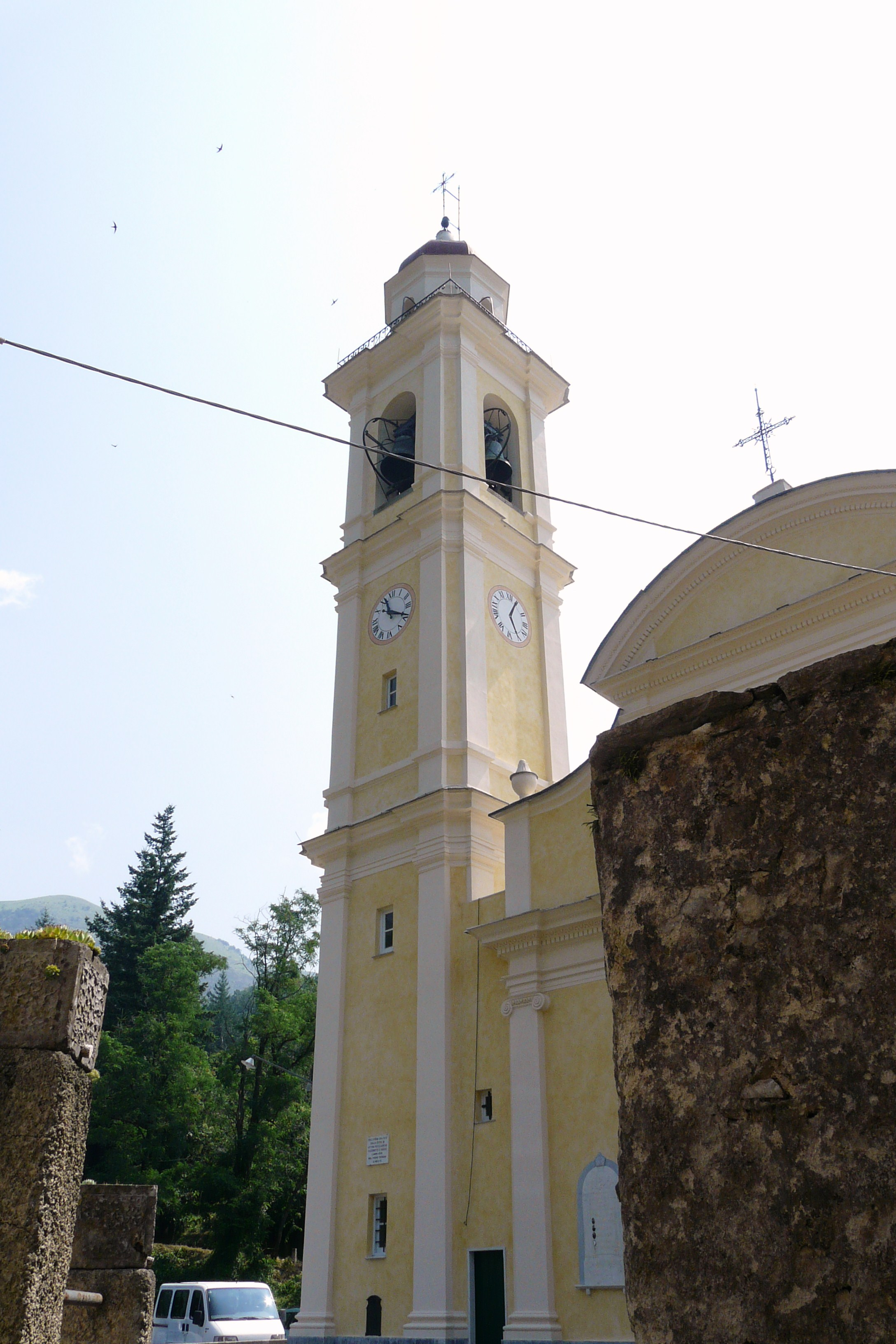 Chiesa di Sant'Apollinare, Reppia, Ne, Liguria, Italia